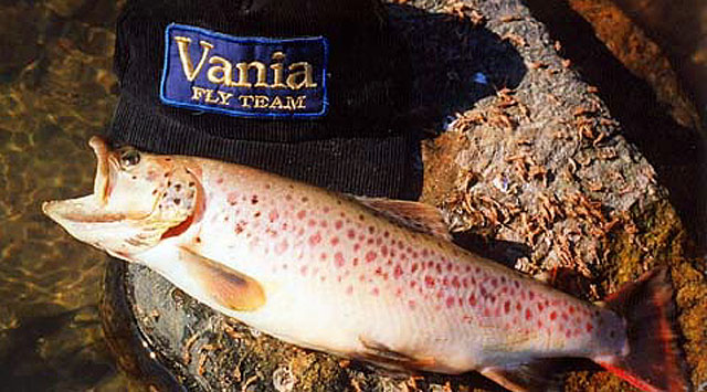 Salmo macedonicus es una especie de pez de la familia Salmonidae en el orden de los Salmoniformes.